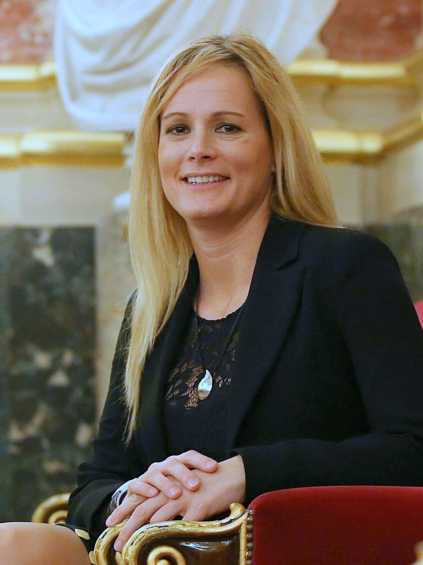 La comandante a la que fichó Pedro Sánchez defiende una "abstención instrumental" de 11 diputados: "El Comité Federal ha decidido abstenerse pero no cómo". Zaida Cantera mantendrá el no a Rajoy este sábado "por convicción", porque argumenta que es el "contrato" que suscribió con los votantes del PSOE. "No quiero enjuiciar moralmente ninguna de las posturas. Solo quiero que entiendan mi postura que es que lo que no quiero para mí no lo quiero para nadie"